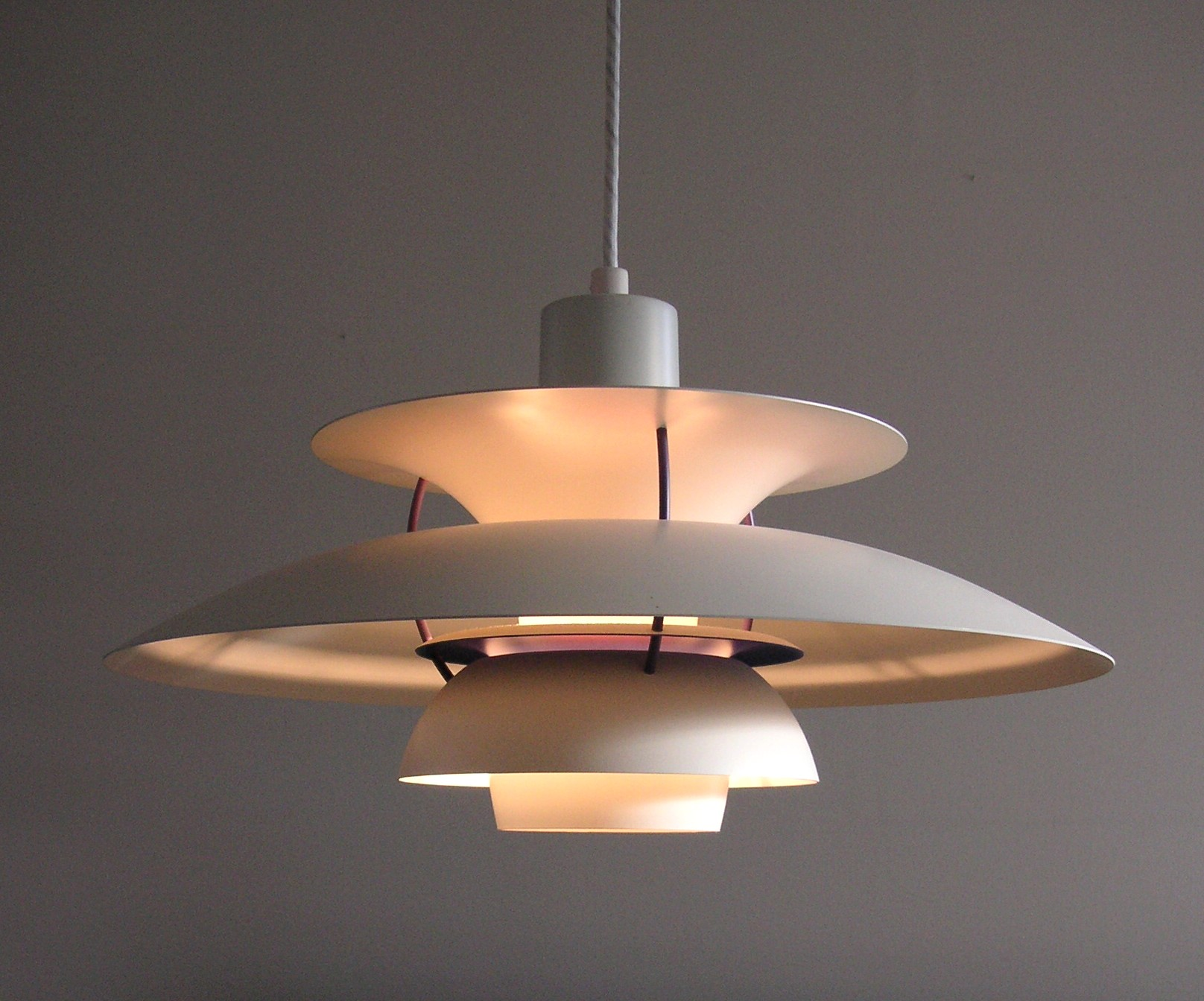 Poul Henningsens PH-Lampe von 1925